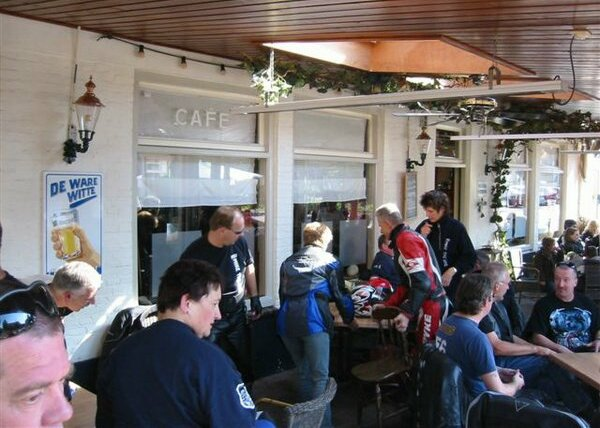 Motorrijders op een terras.